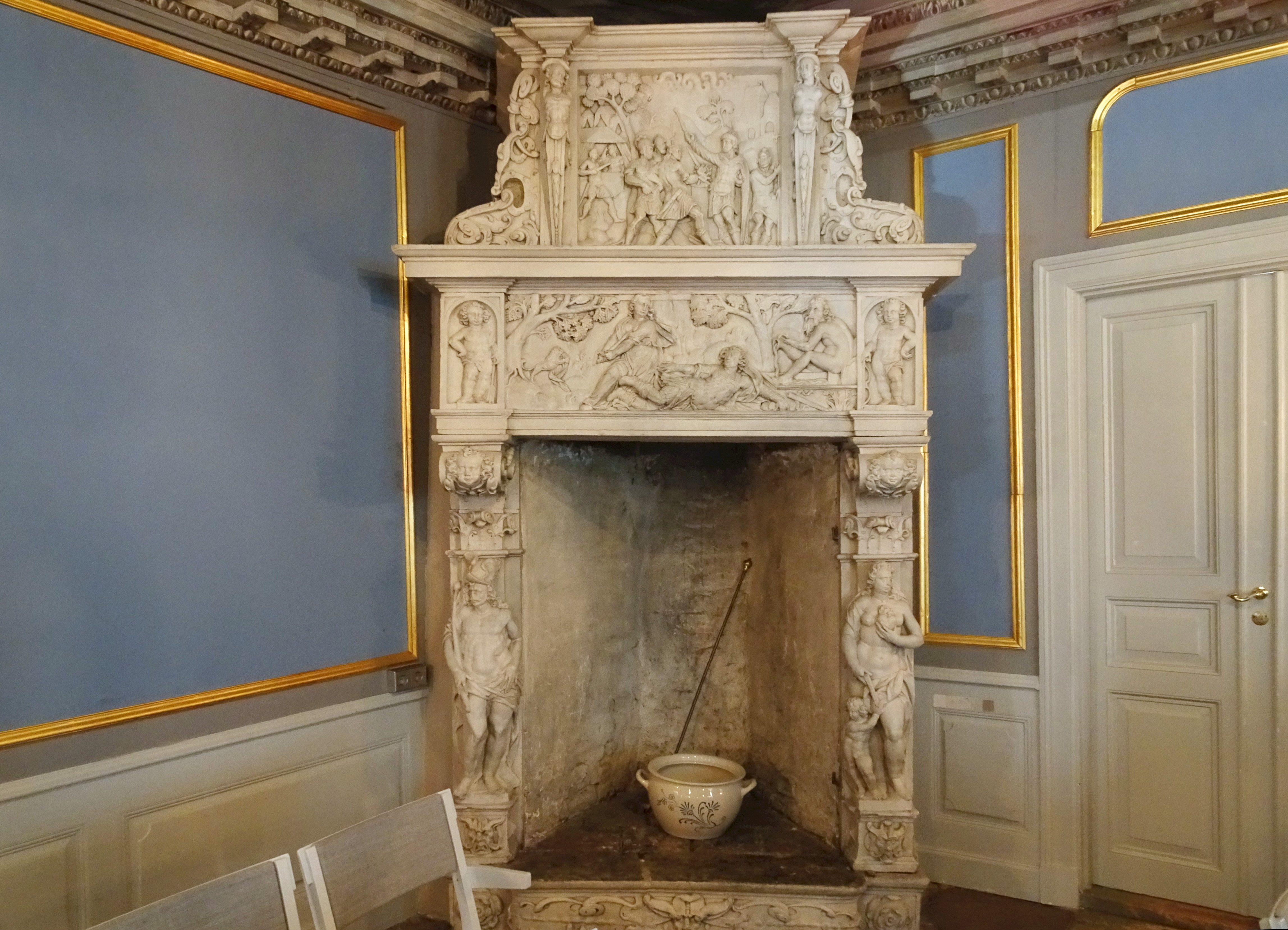 Ekebyhov, interiör, sandstensspisen i Wrangelska salen